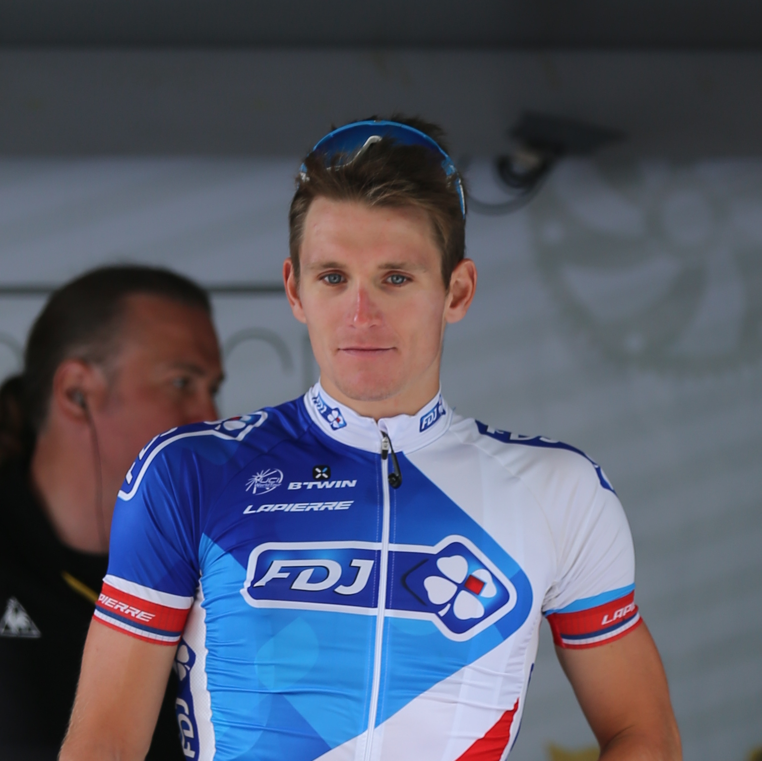 Arnaud Démare lors du départ de la 8e étape du Tour de France 2015 à Rennes.